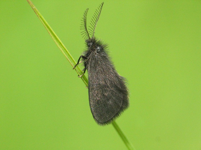 Upper Austria, Salzkammergut, Bad Goisern, Pichlern, 2005.06.11 more info (in german)